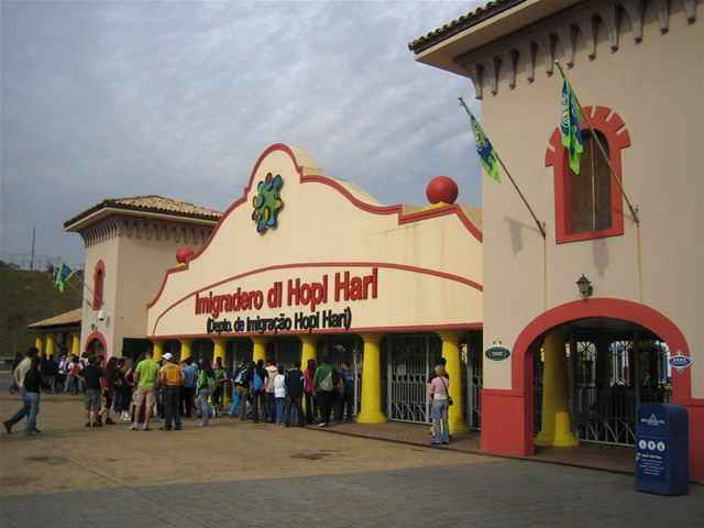 Fila